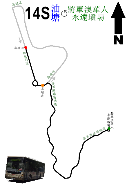 中文（香港）: 九巴14S線的走線圖